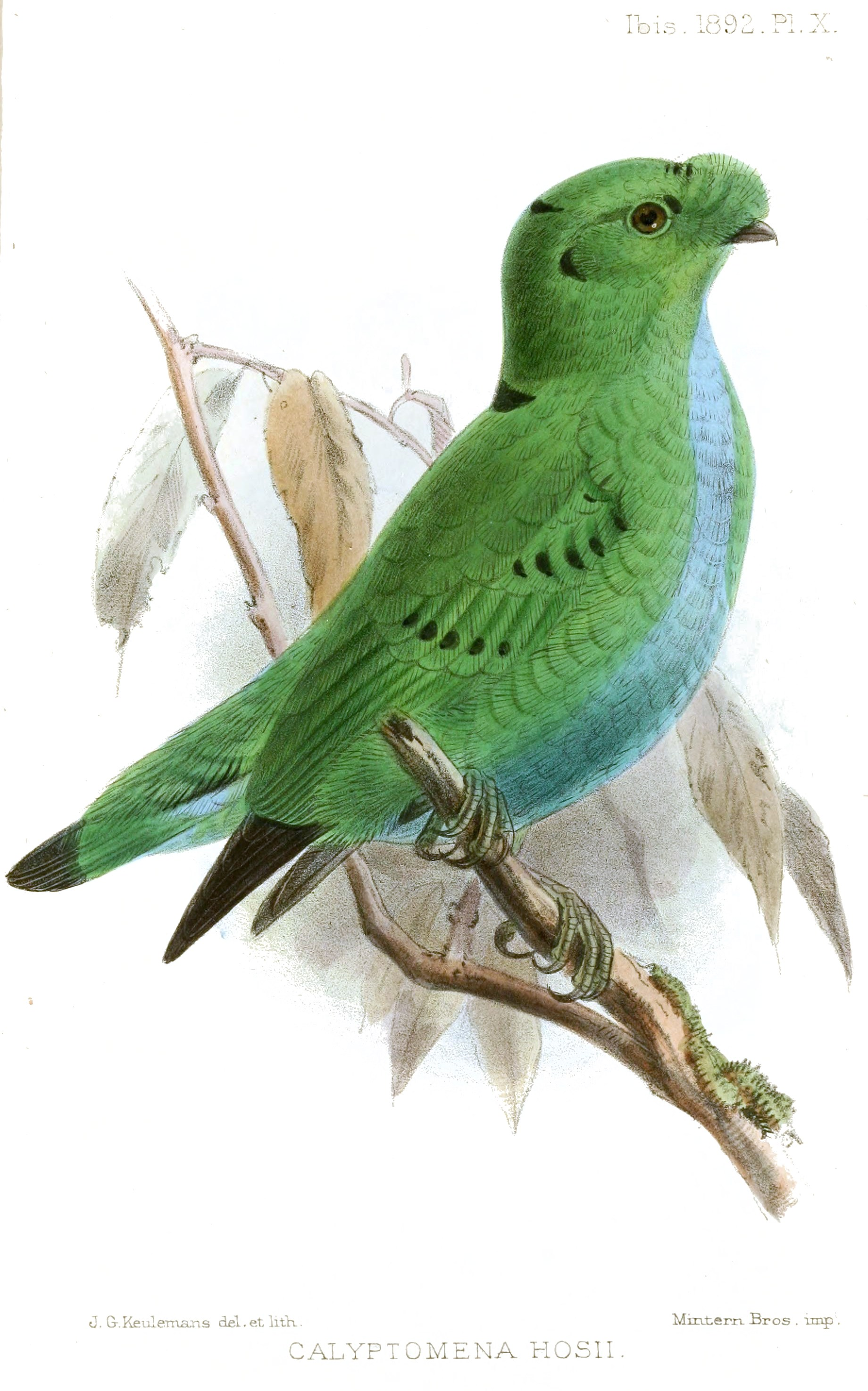 Calyptomena hosii)